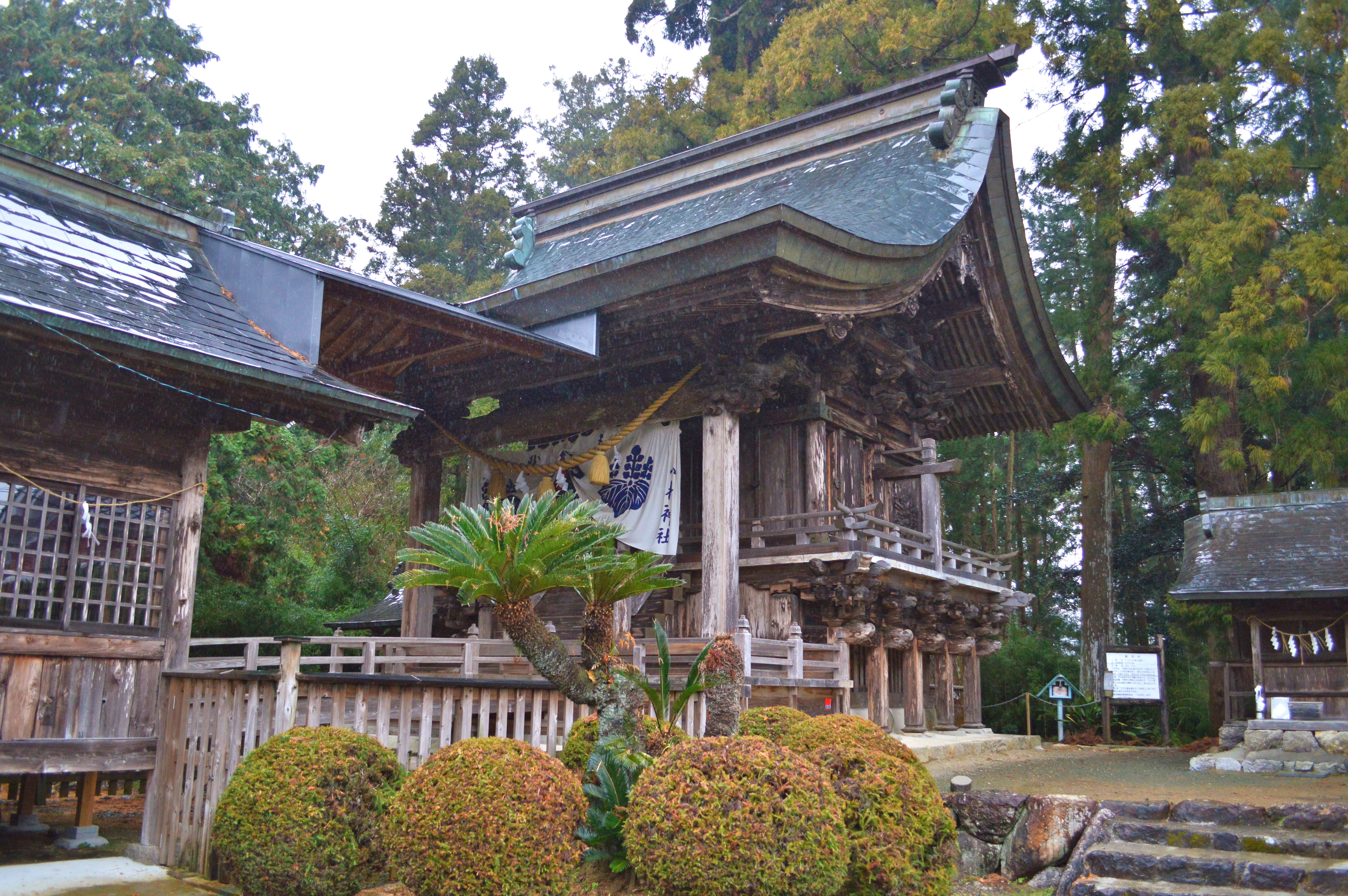 小村神社 本殿